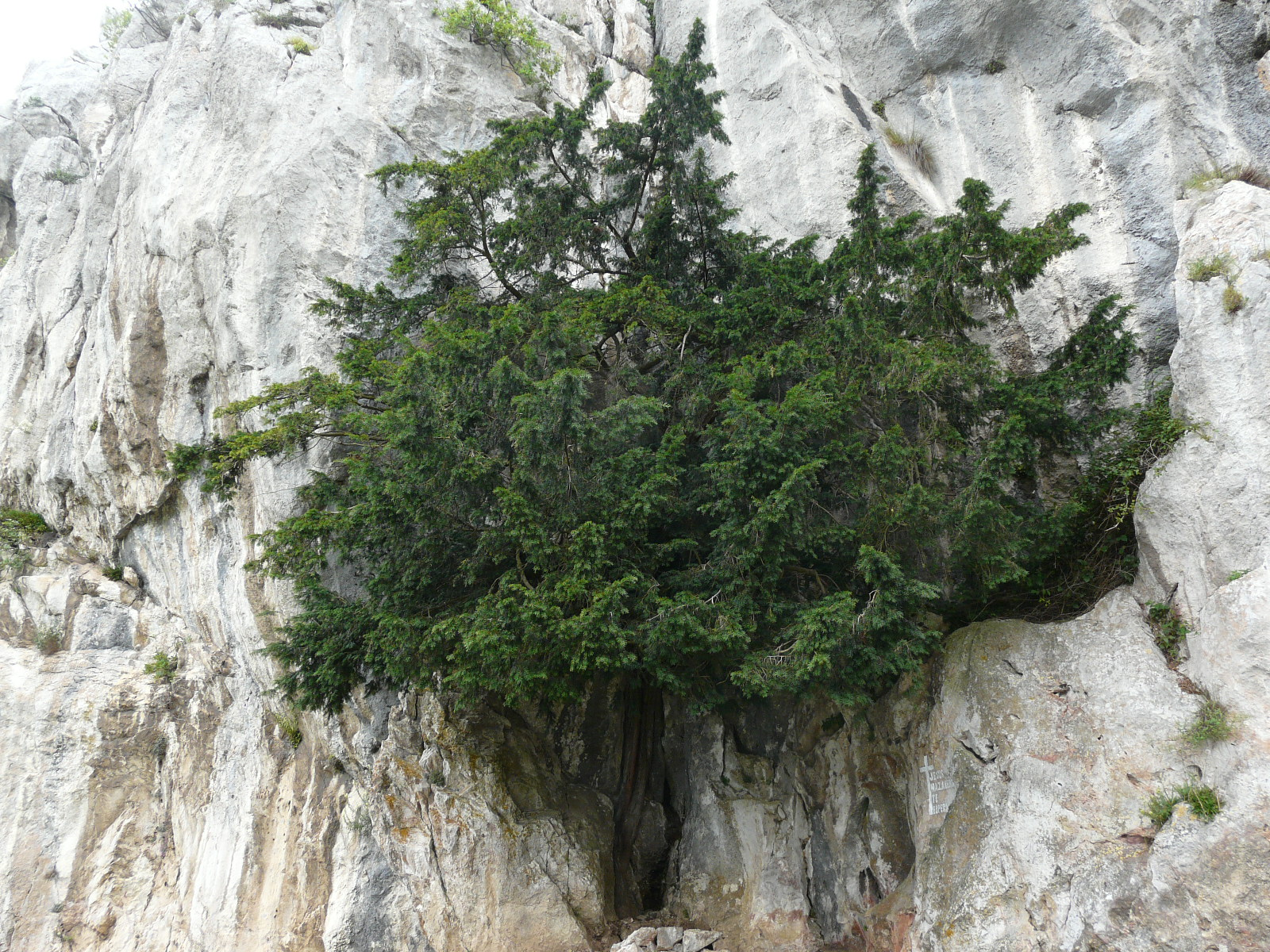 Ejemplar de tejo (Taxus Baccata) creciendo de la roca en el Monsacro.